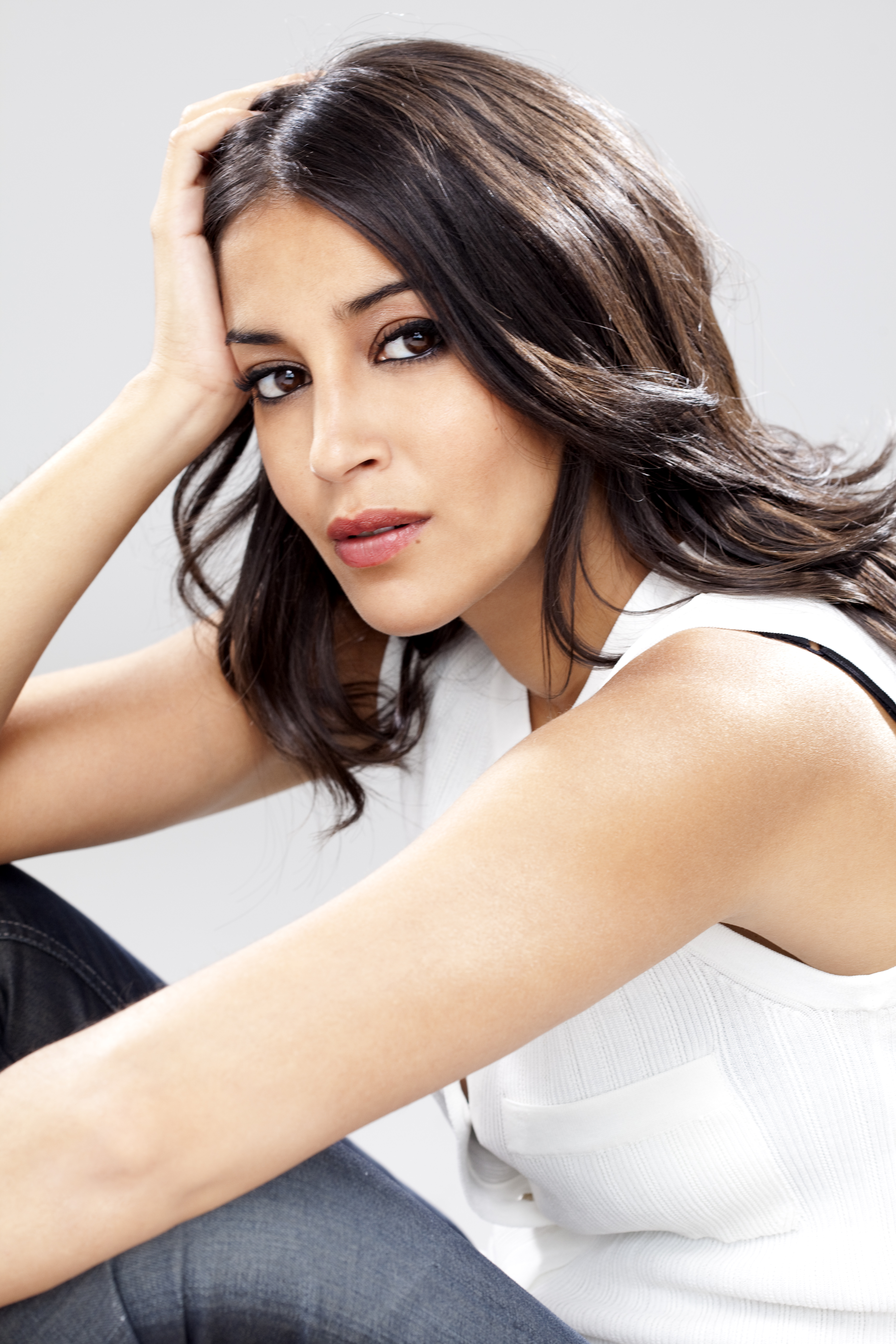 Portrait de Leila Bekhti